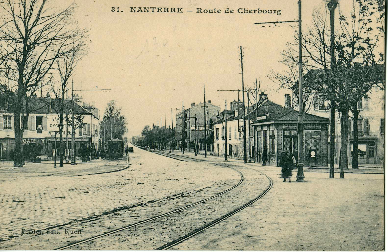 Carte postale ancienne éditée par Ferdet à Rueil :NANTERRE - Route de Cherbourg